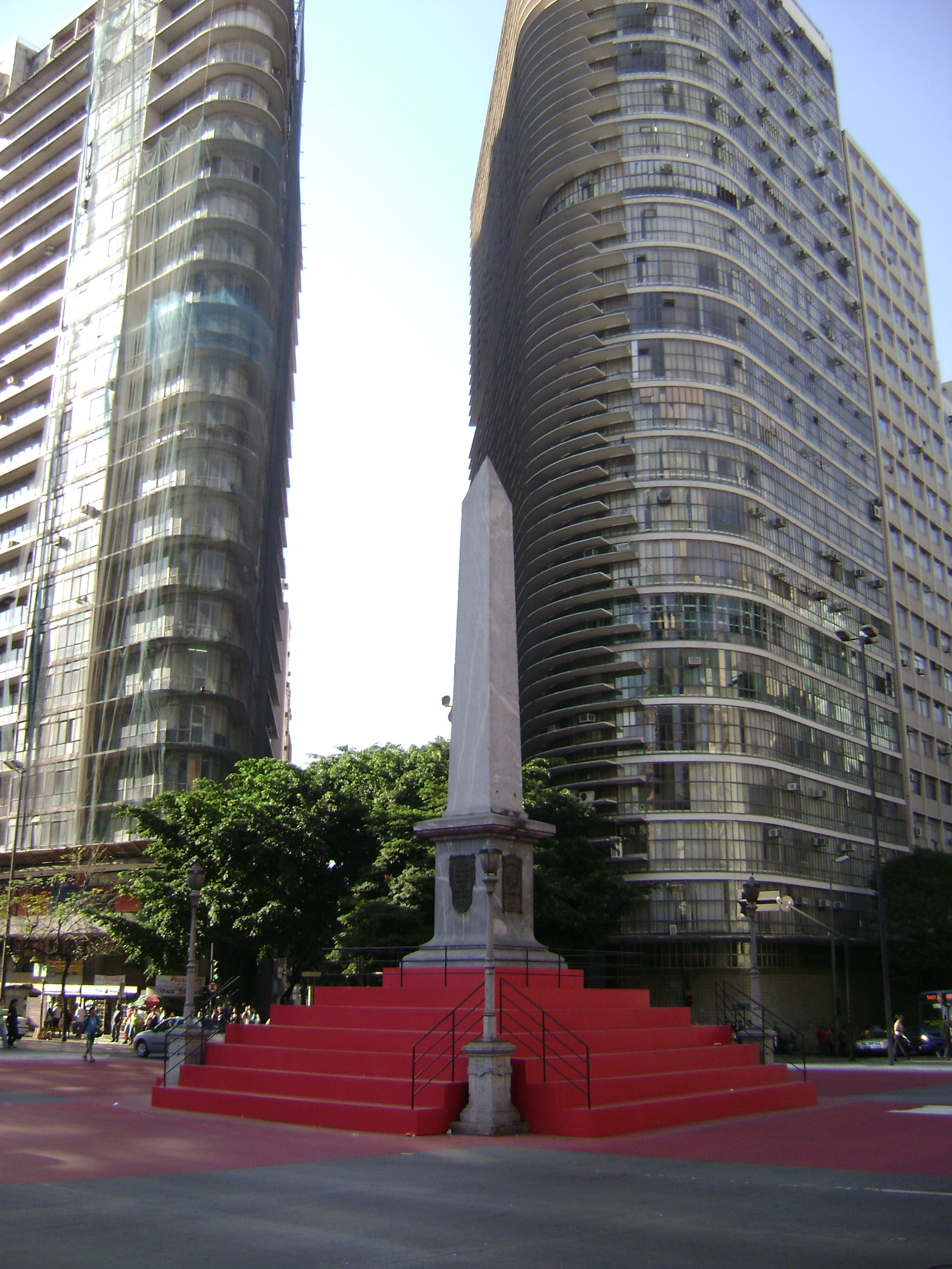 Obelisco da Praça Sete durante o Festival Internacional de Teatro, Palco e Rua, em Belo Horizonte.